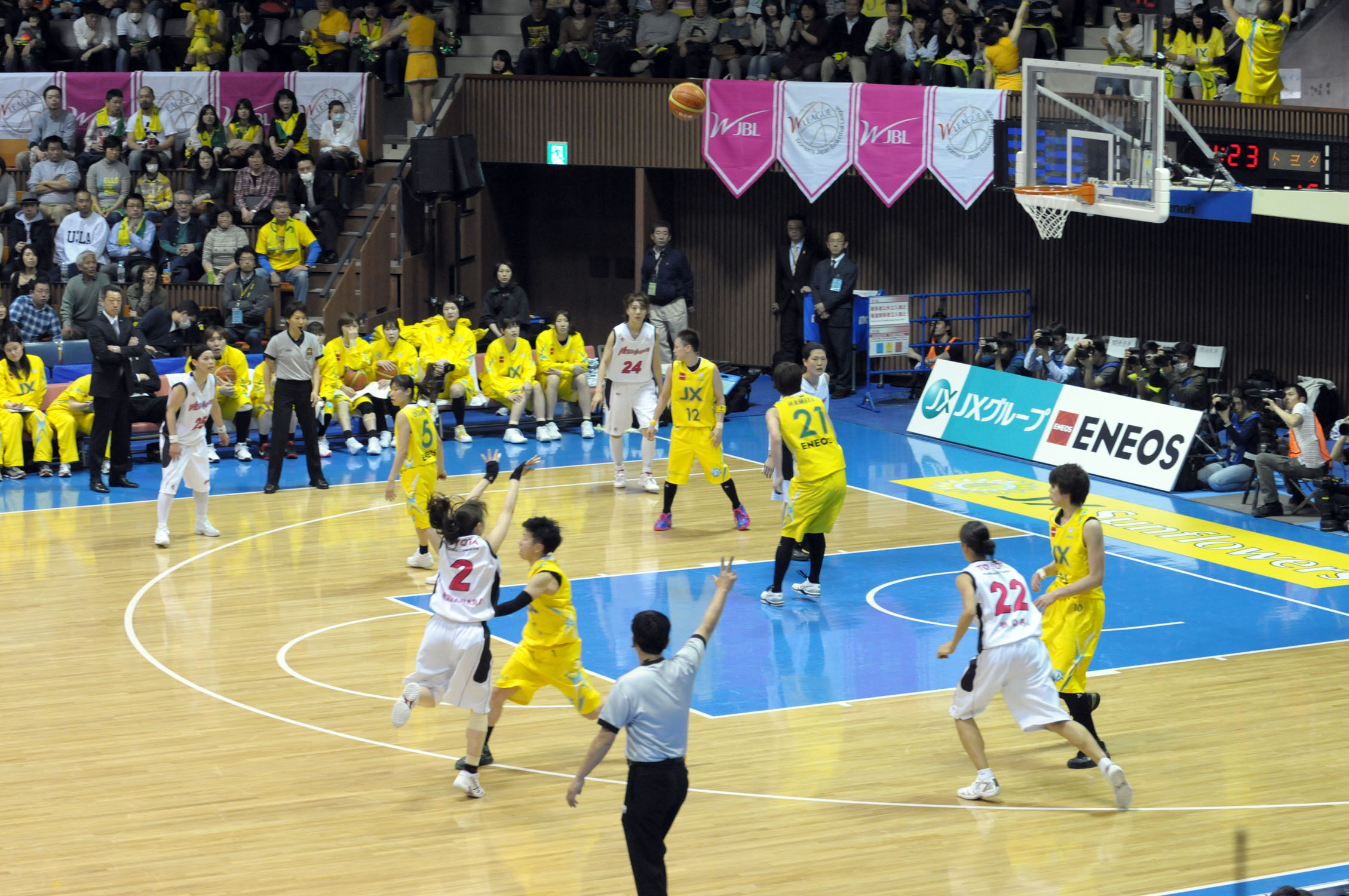 WJBL 12-13プレーオフファイナル、、トヨタ対JX。代々木第二体育館で。